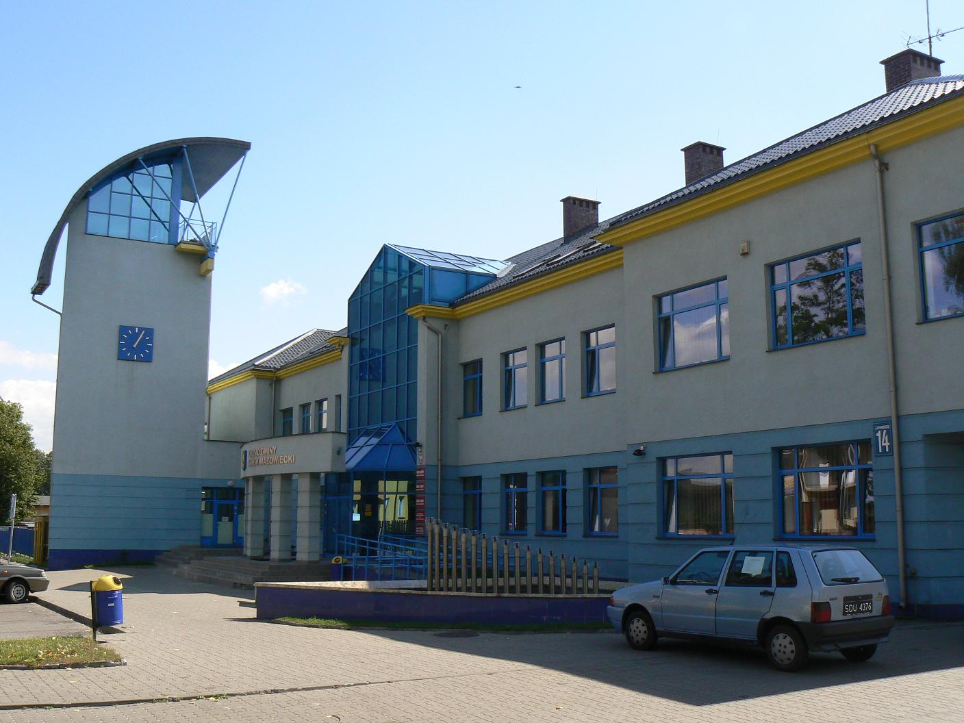 Siedziba Urzędu Gminy wiejskiej Mińsk mazowiecki